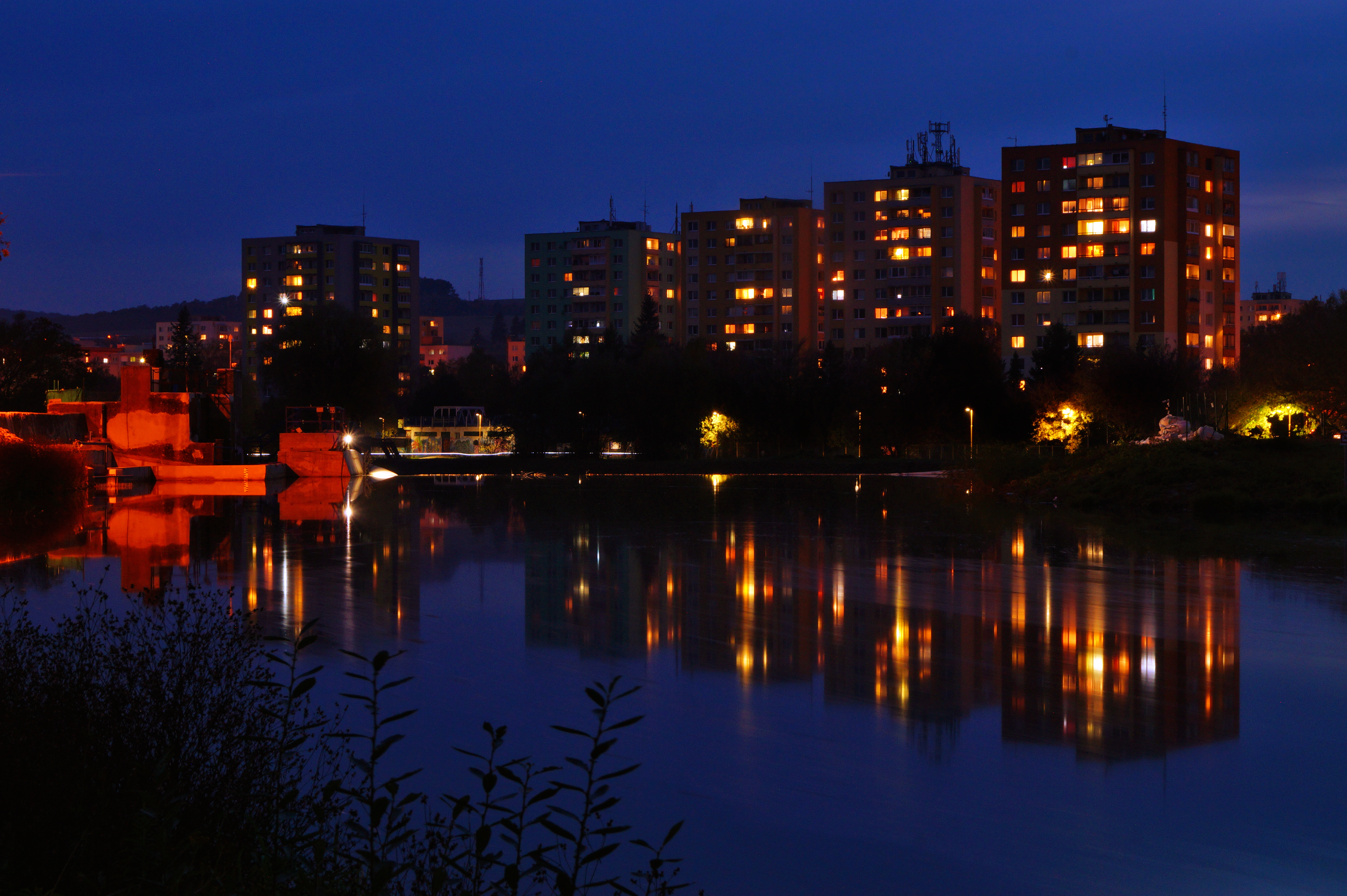 Hať na rieke Torysa, Prešov - Sídlisko 3, v pozadí paneláky na ulici Antona Prídavka